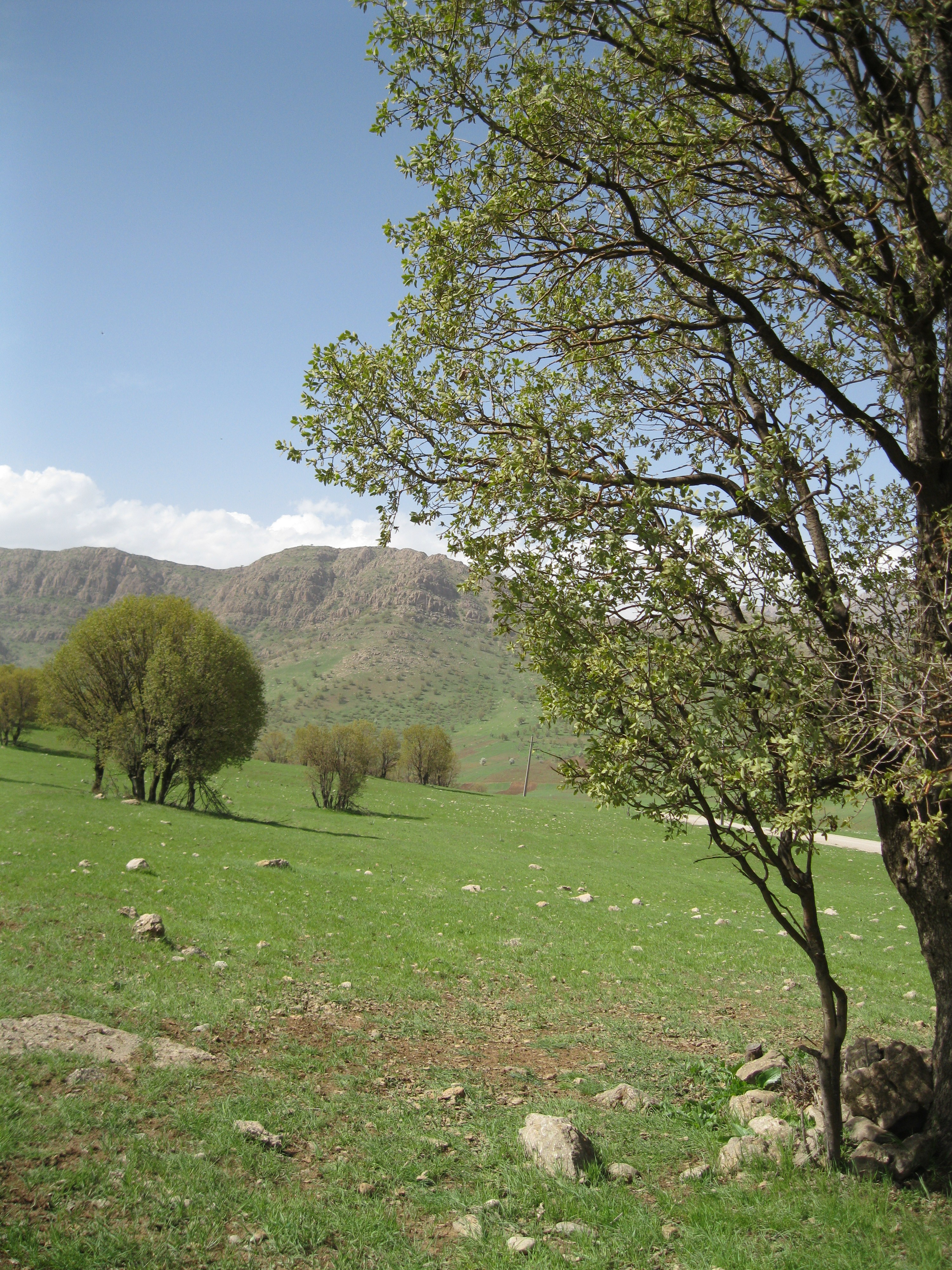 طبیعت شهرستان خرم‌آباد